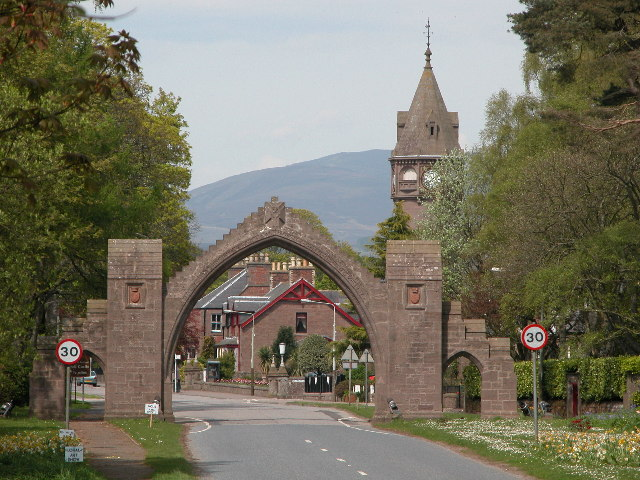 Dalhousie Arch, Edzell, Angus